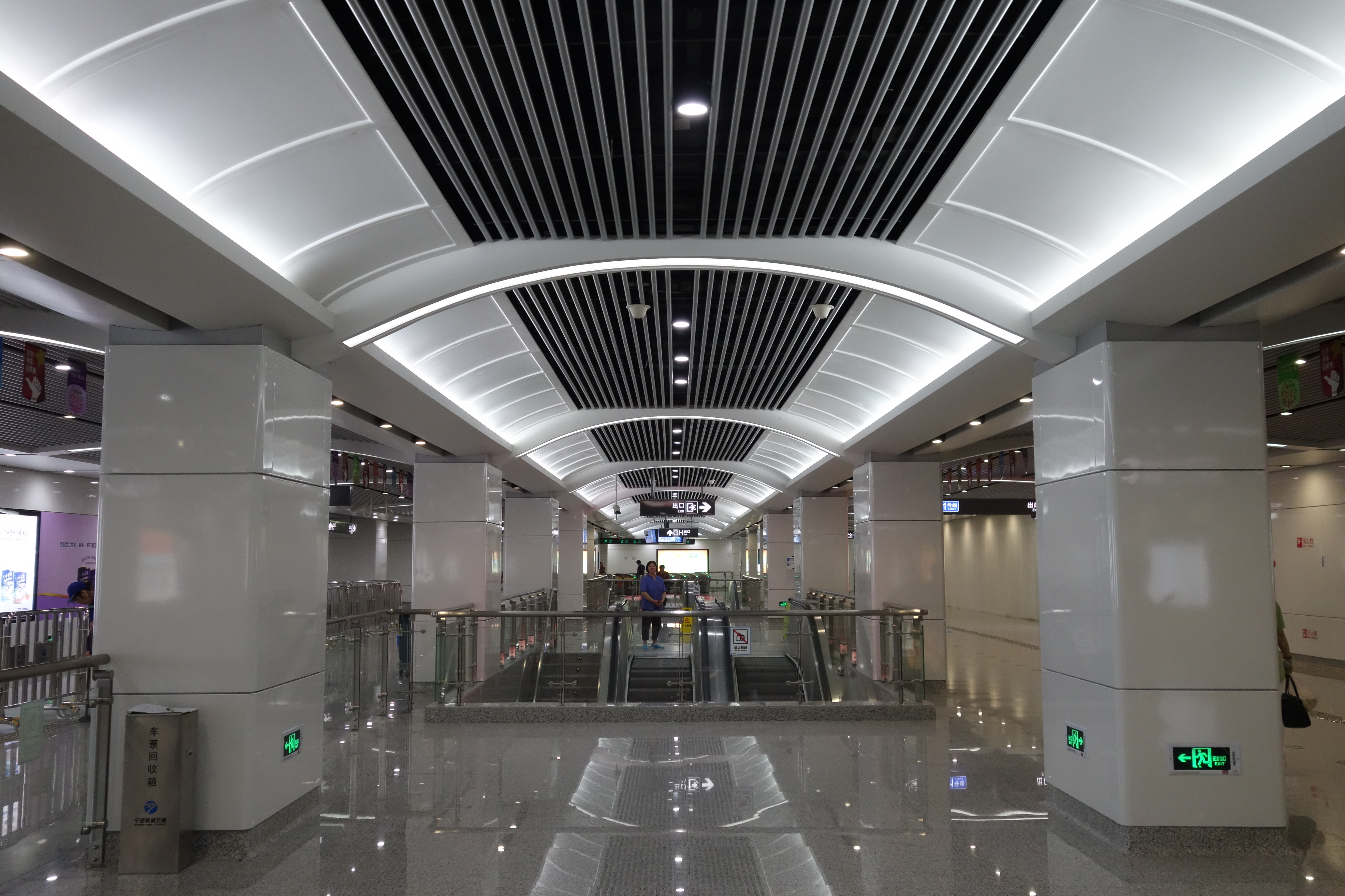 鼓楼站站厅